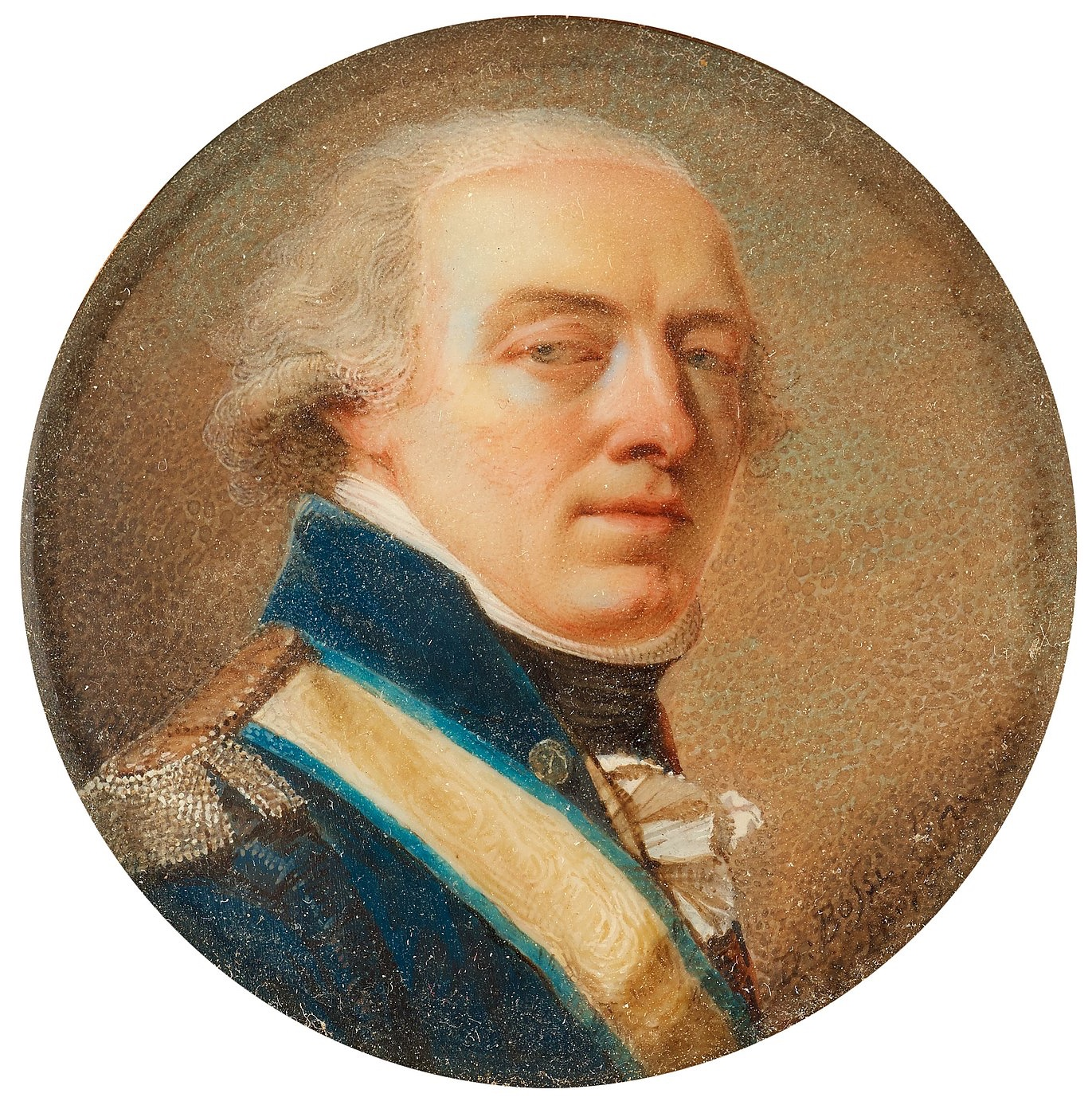 Porträtt av Johan Fredrik Aminoff (1756-1842) iklädd uniform m/1792 för Björneborgs regemente. Med Svärdsordens band över axeln. Signerad D. Bossi Pinx.